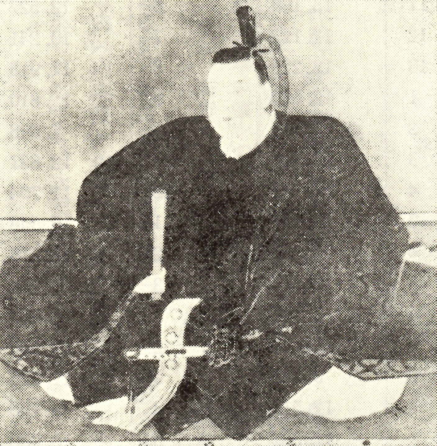 永井直陳の肖像。